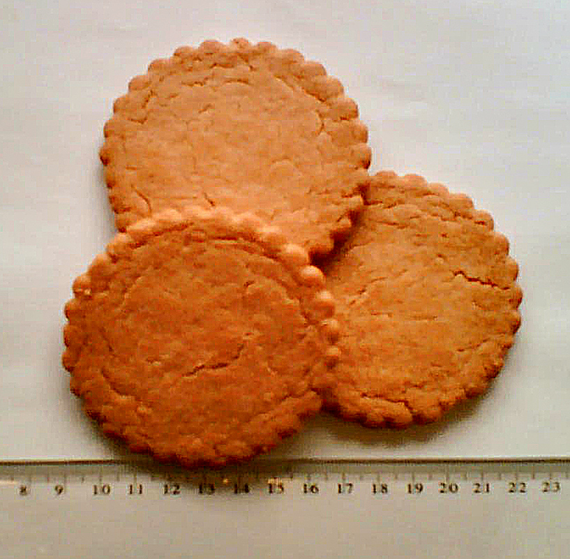 Zelfgemaakte foto.